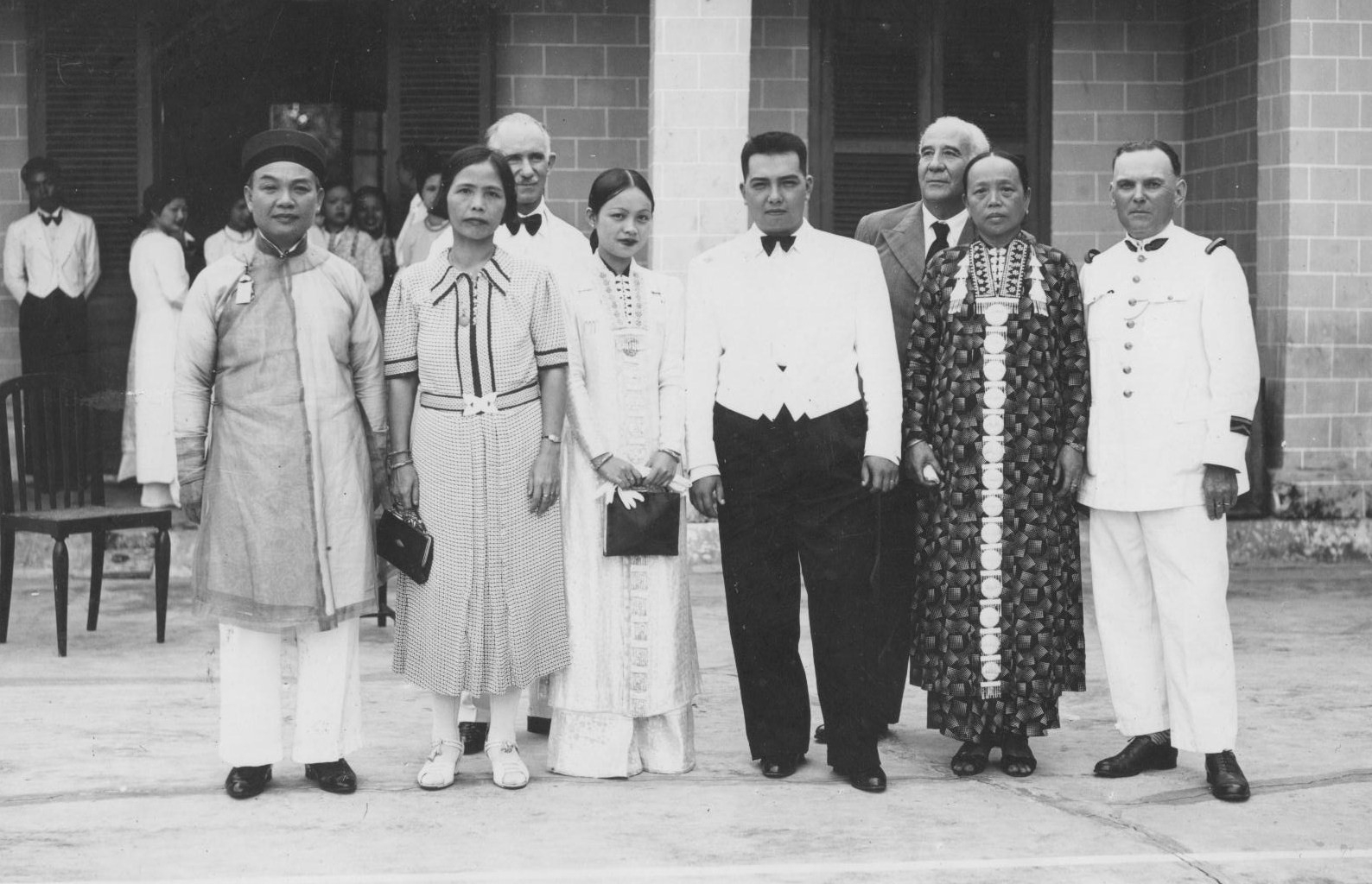 Mariage de La Princesse Deo Nang Toï fille du Seigneur du Pays Taï Deo Van long avec Monsieur Louis Bordier Ingénieur Agronome - 1940 Indochine